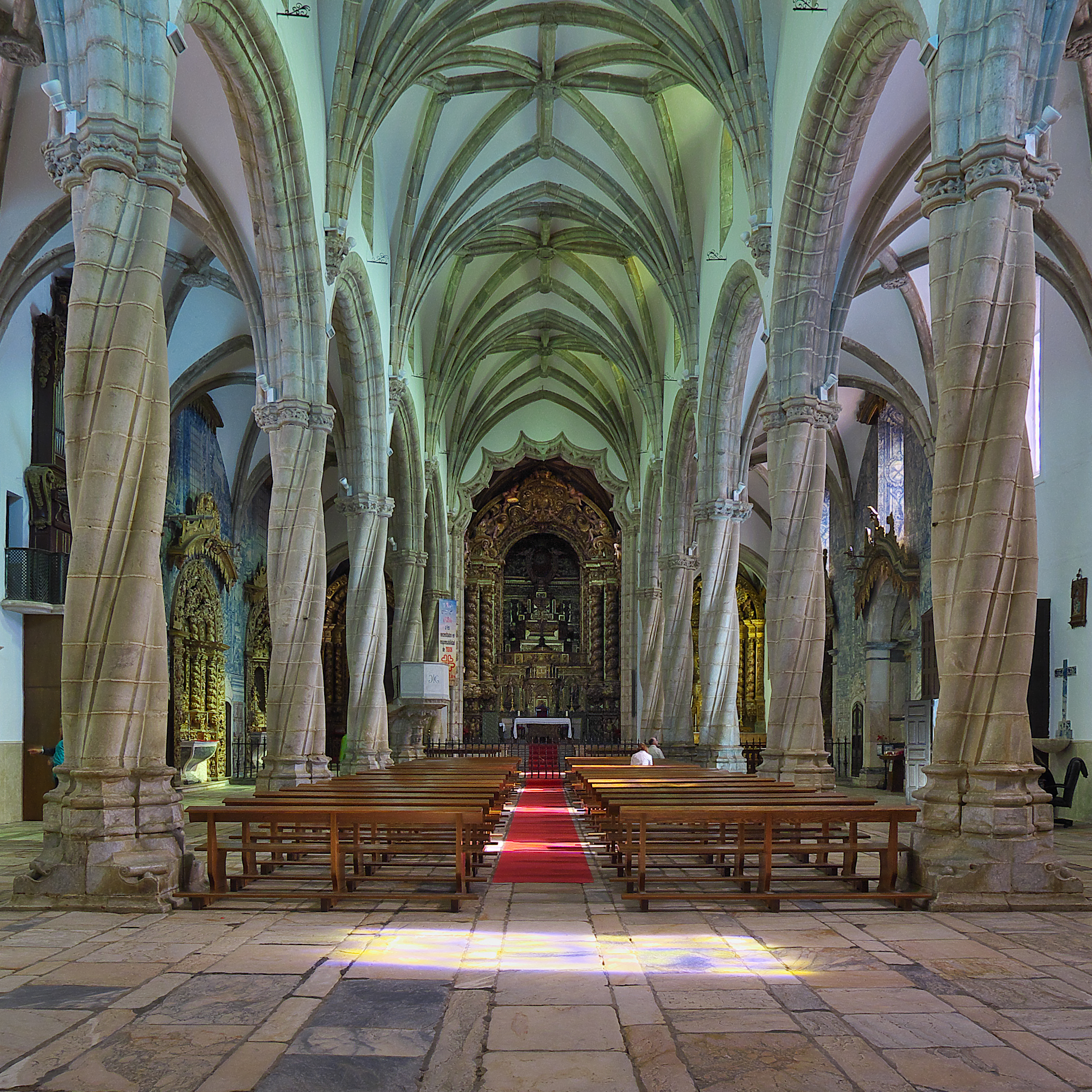 Exponente del arte y la arquitectura portuguesa del siglo XVI. Se acepta la fecha de 1560 como la de finalización del templo.